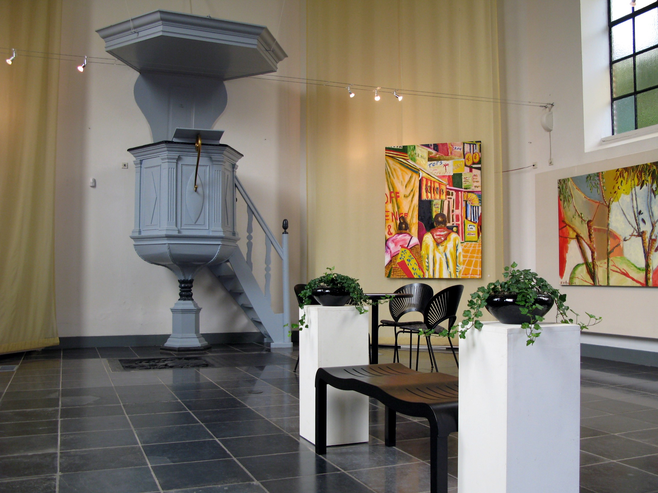 Interior of Koningskerkje in Vierlingsbeek (Netherlands)